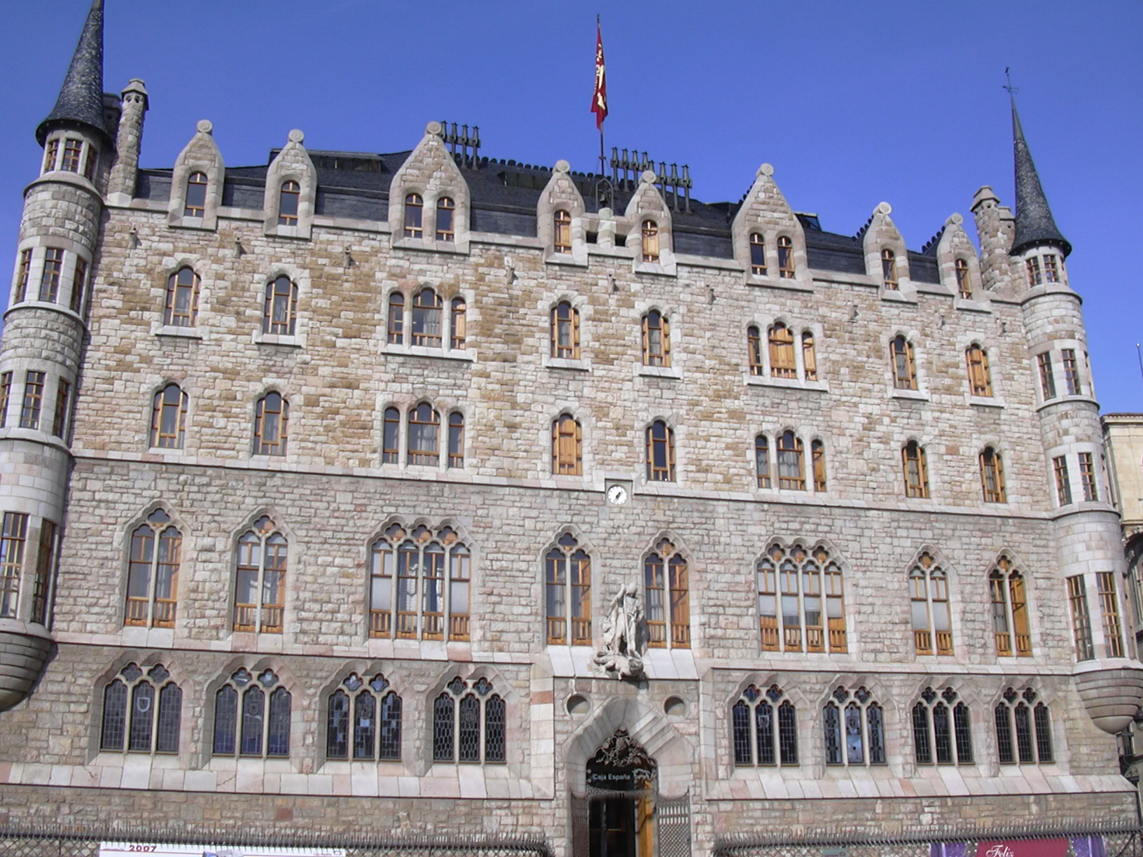 Casa Botines en León, España